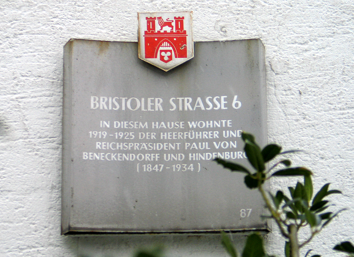 Die etwas versteckt an der Bristoler Straße 6 angebrachte hannoversche Stadttafel Nummer 87 erläutert: "In diesem Hause wohnte 1919 - 1925 der Heerführer und Reichspräsident Paul von Beneckendorff und Hindenburg (1847-1934)." ...